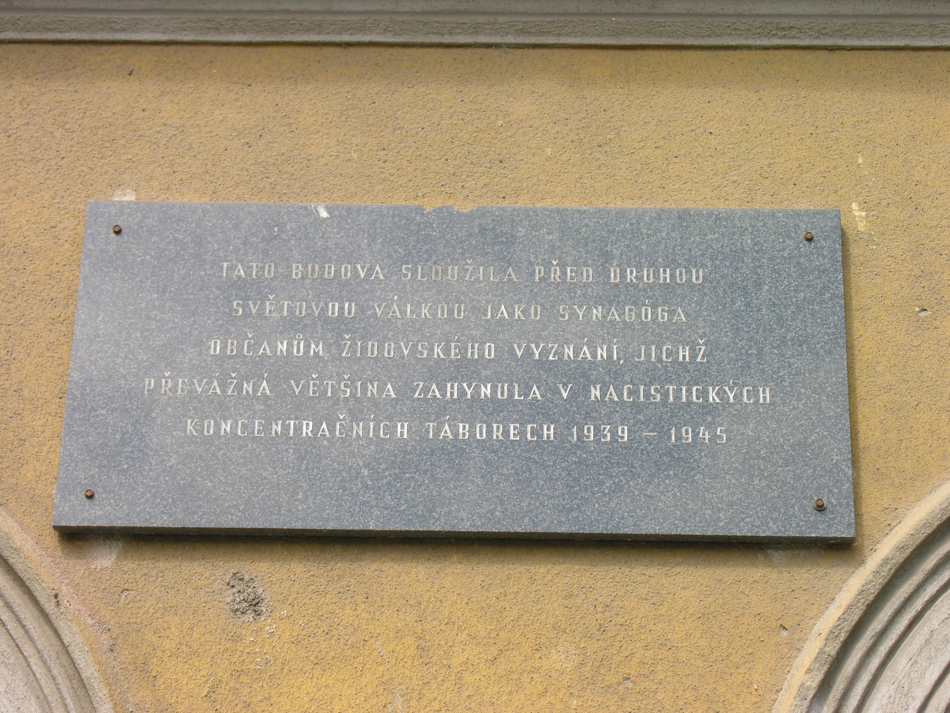 Karniów. Tablica na synagodze